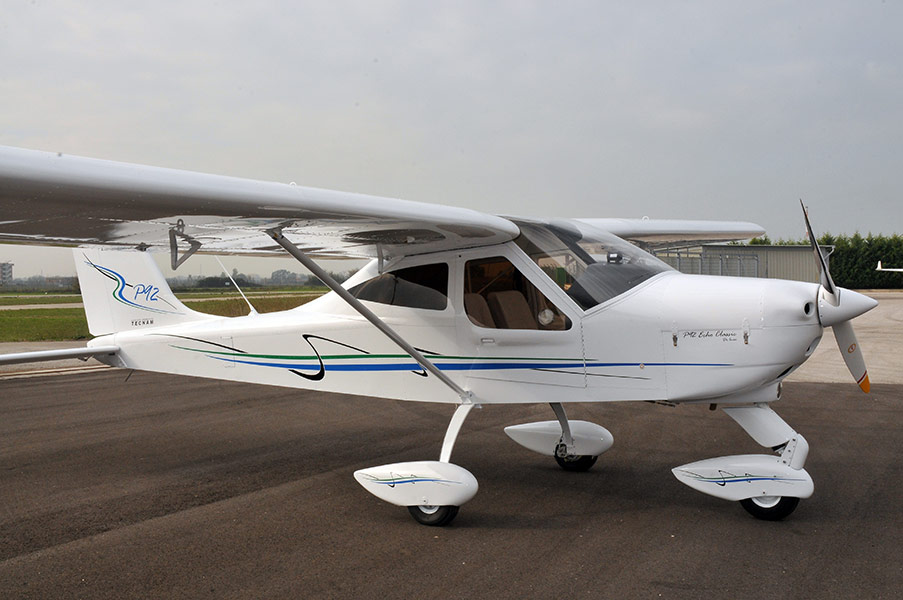 Tecnam P92